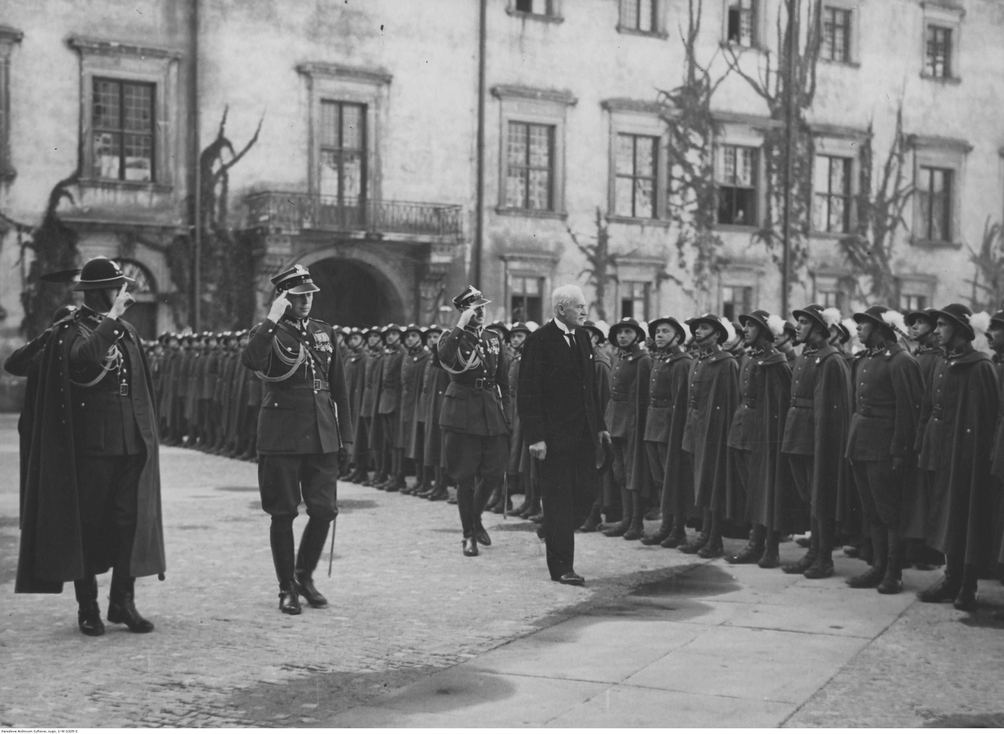 Wizyta 5 Pułku Strzelców Podhalańskich w Warszawie. Prezydent Ignacy Mościcki przechodzi przed frontem Pułku po złożeniu mu hołdu na dziedzińcu Zamku Królewskiego. Widoczni także od lewej: adiutanci prezydenta RP kapitan Strzelców Podhalańskich Józef Hartman i mjr Zygmunt Gużewski oraz płk Kazimierz Schally. Koncern Ilustrowany Kurier Codzienny - Archiwum Ilustracji. Sygnatura: 1-W-1325-2